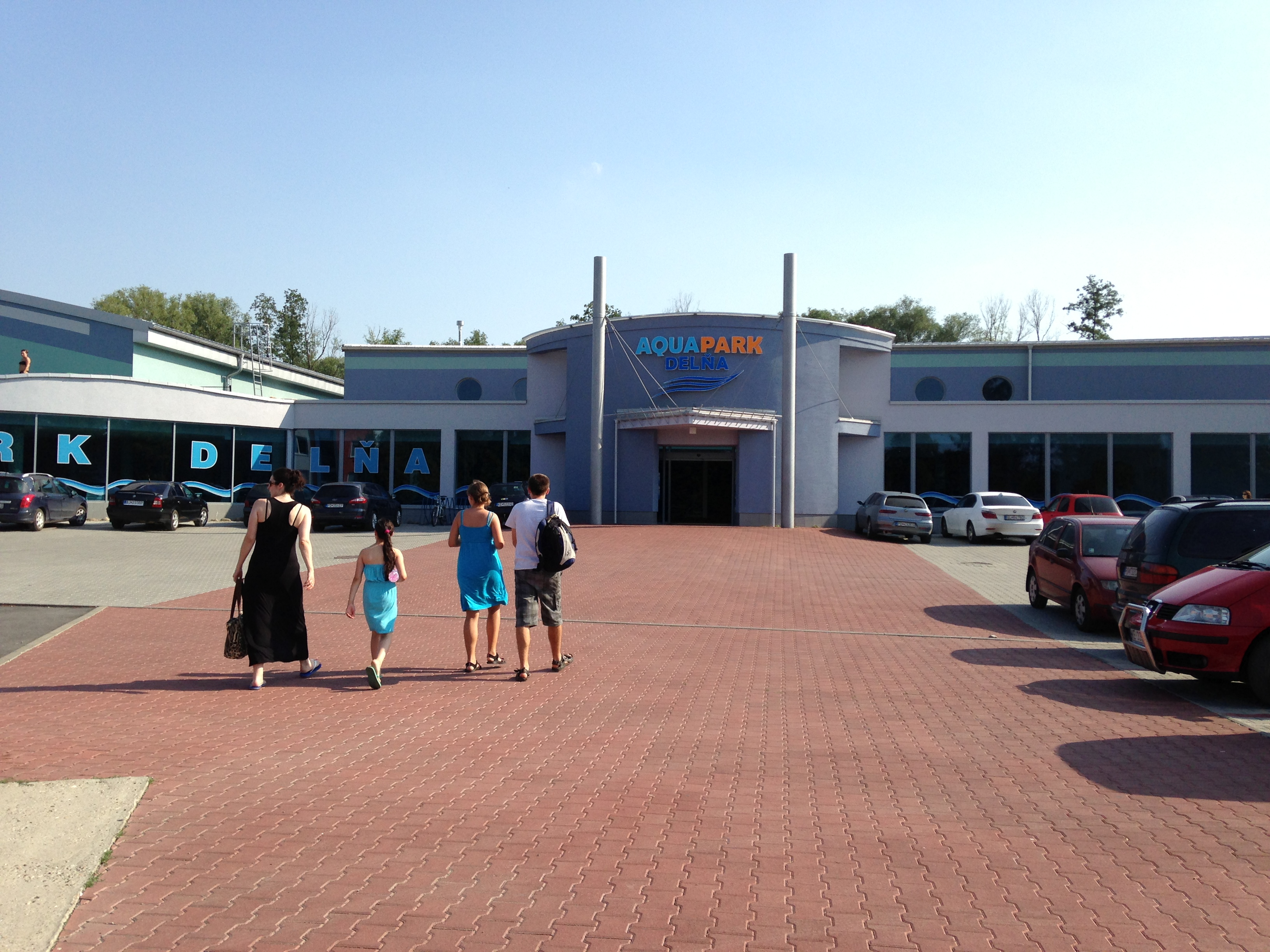 Areál Aquaparku Delňa